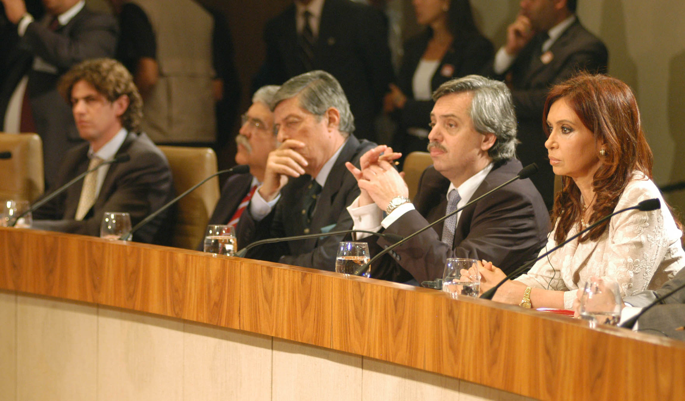 Ministros de Cristina de Kirchner.